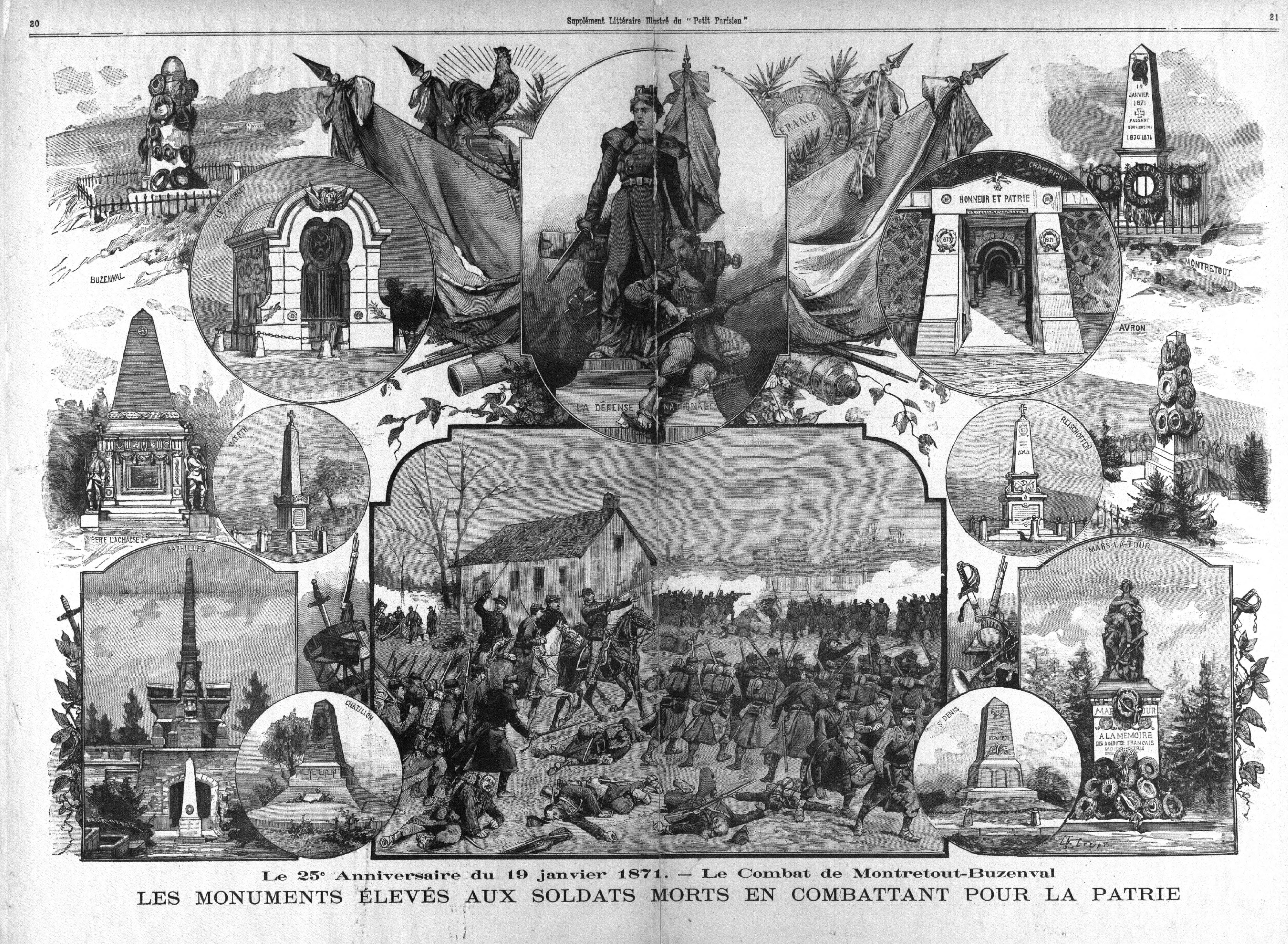 Pages 20-21 du Petit Parisien